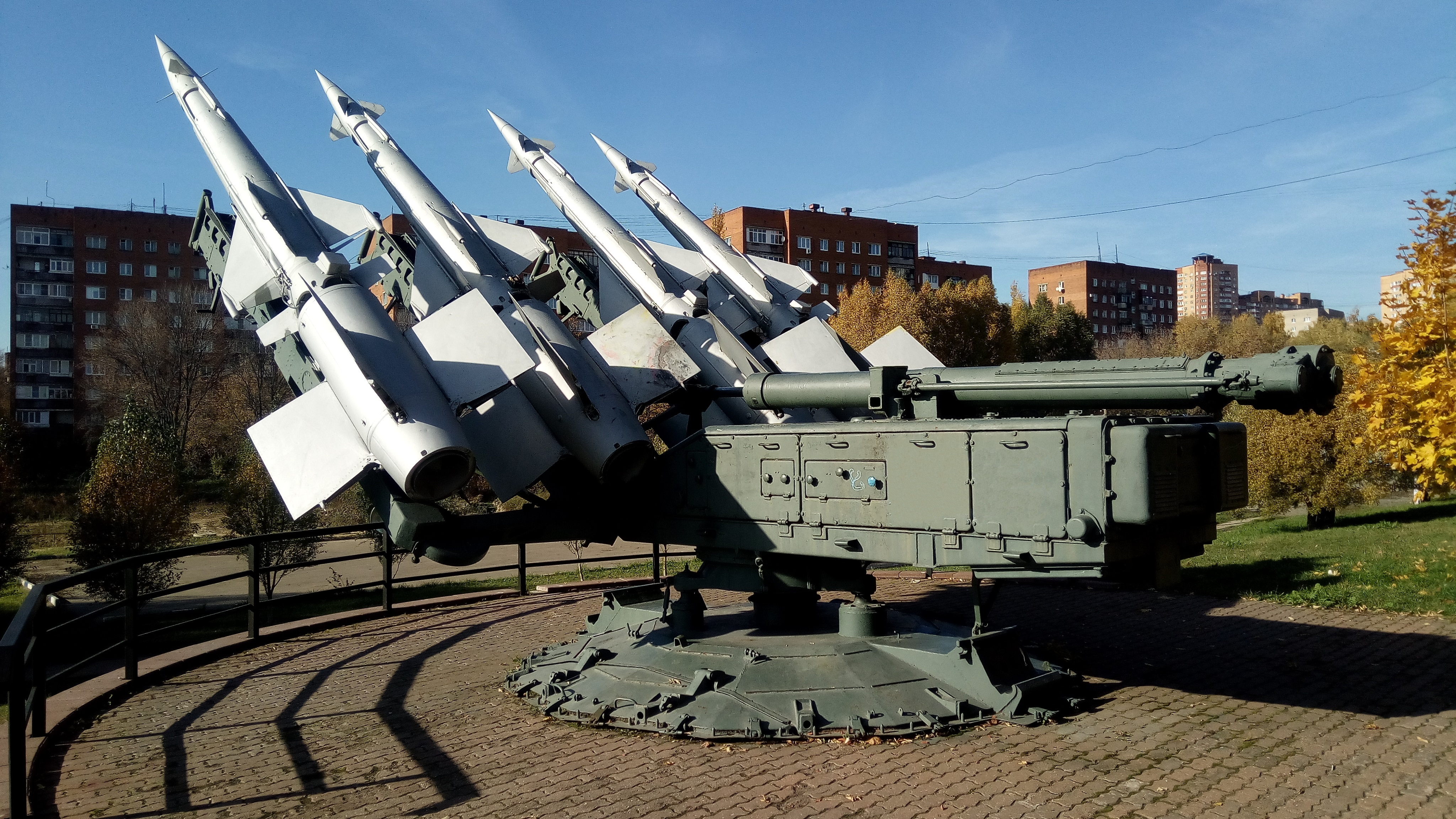 ЗРК С-125 (Дзержинский)